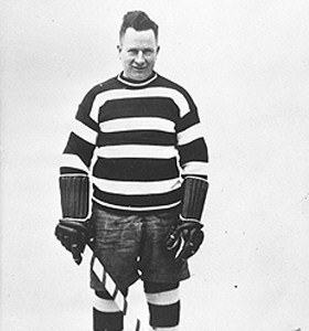 Cy Denneny